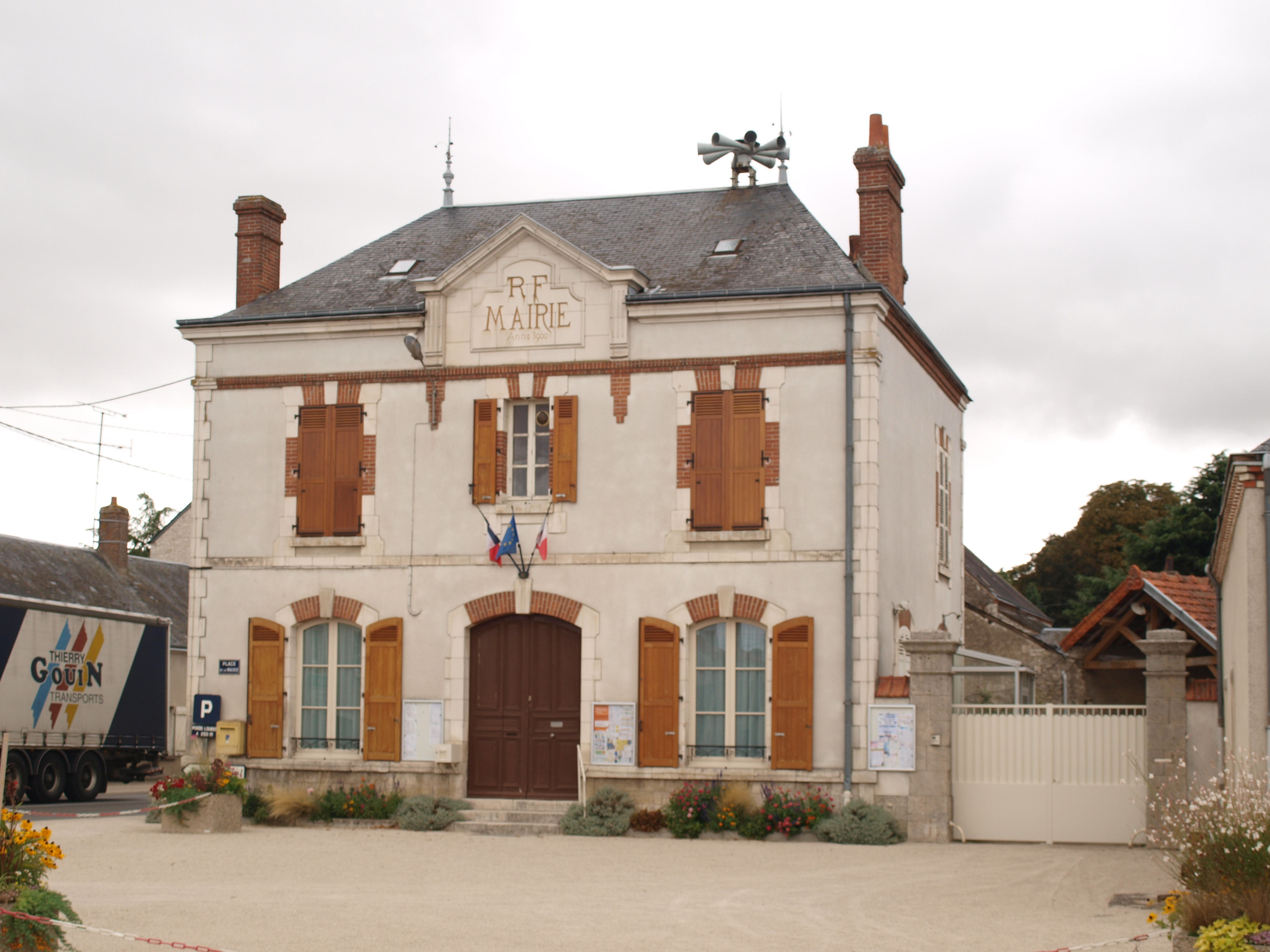 Saint-Péravy-la-Colombe (Loiret, France) ; mairie